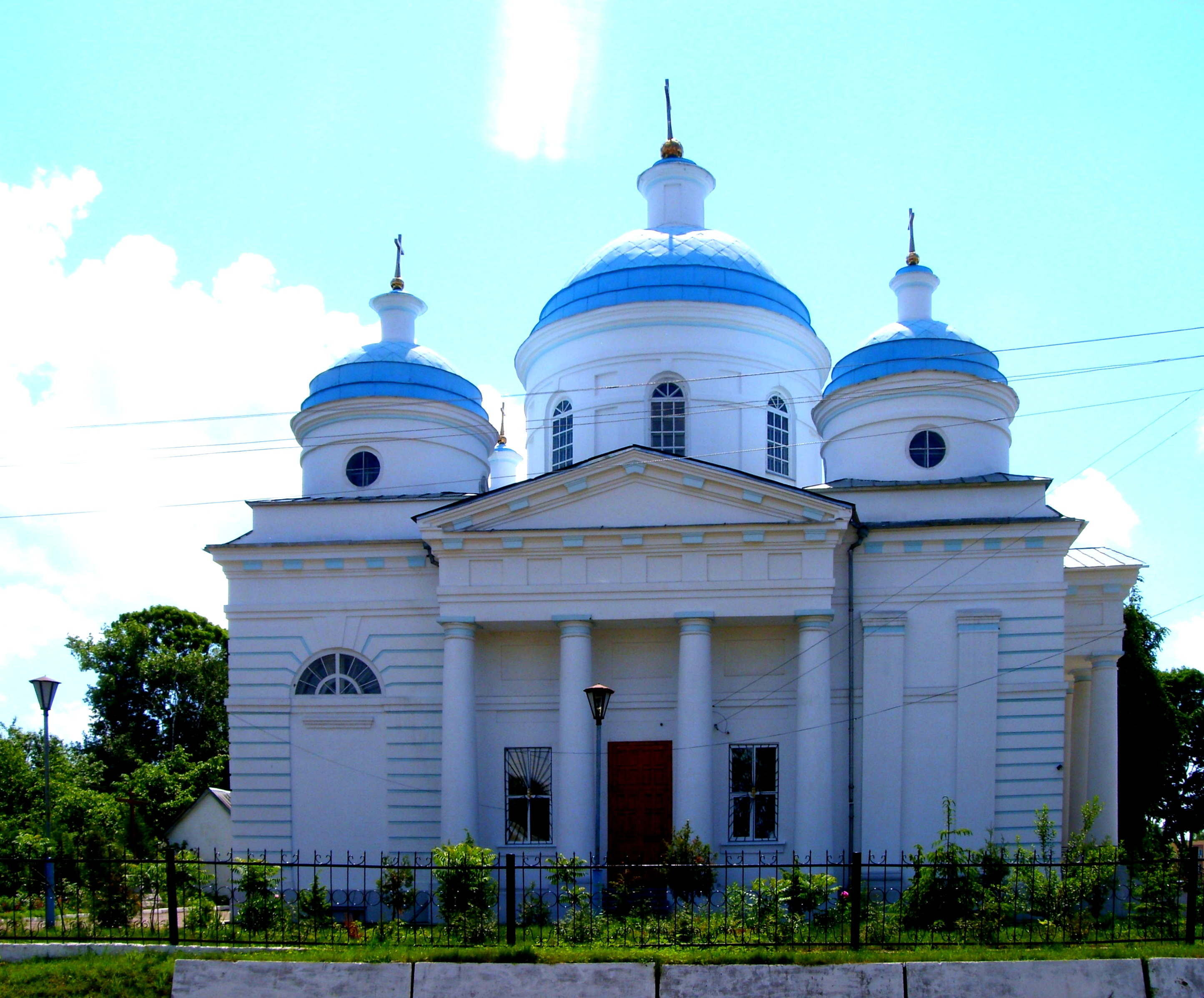 Собор Успенский (Брянская область, Мглин, Пролетарская улица)